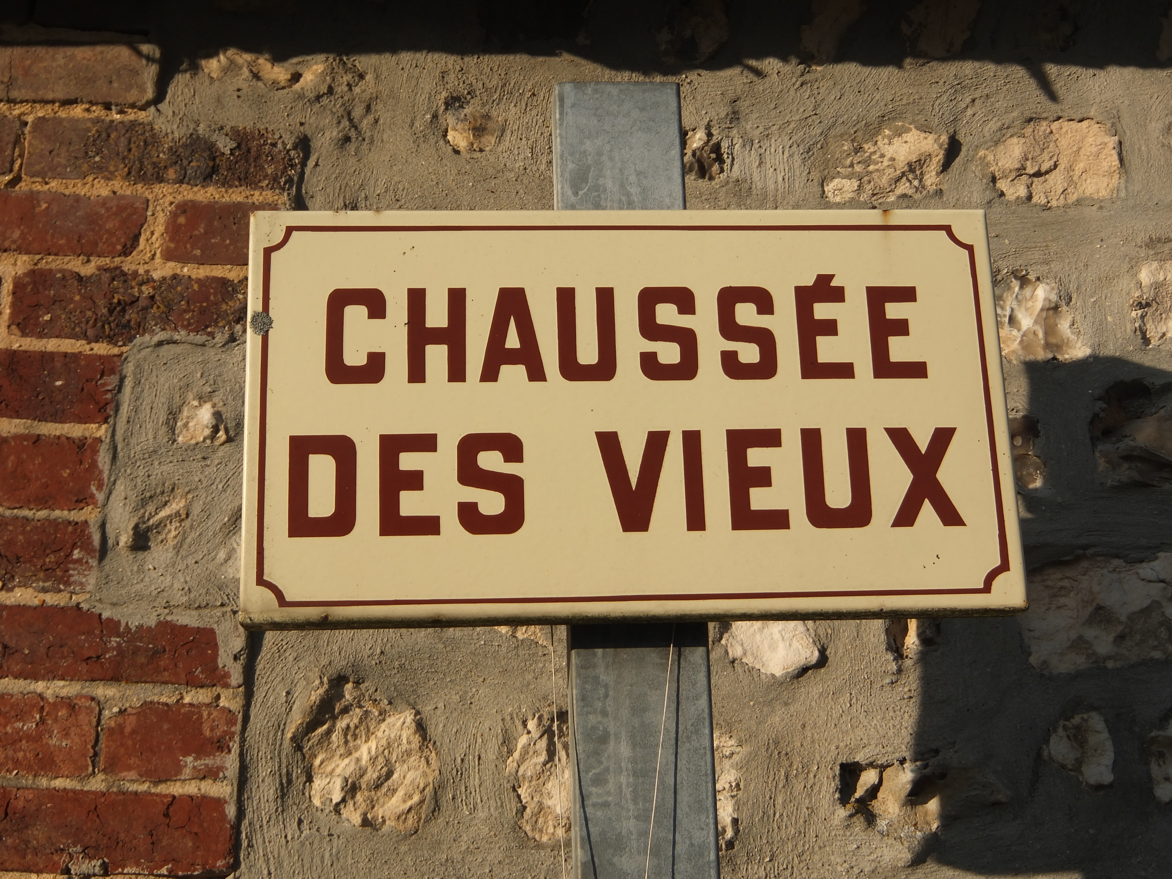 Route qui mène à la Seine Straße bis zur Seine